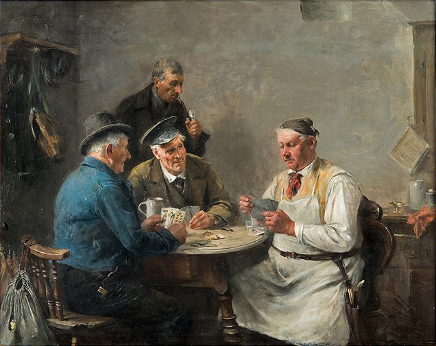 Kartenspieler